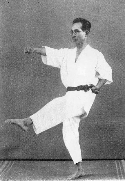 遠山寛賢の五十四歩(Toyama Kanken, 1888 - 1969)